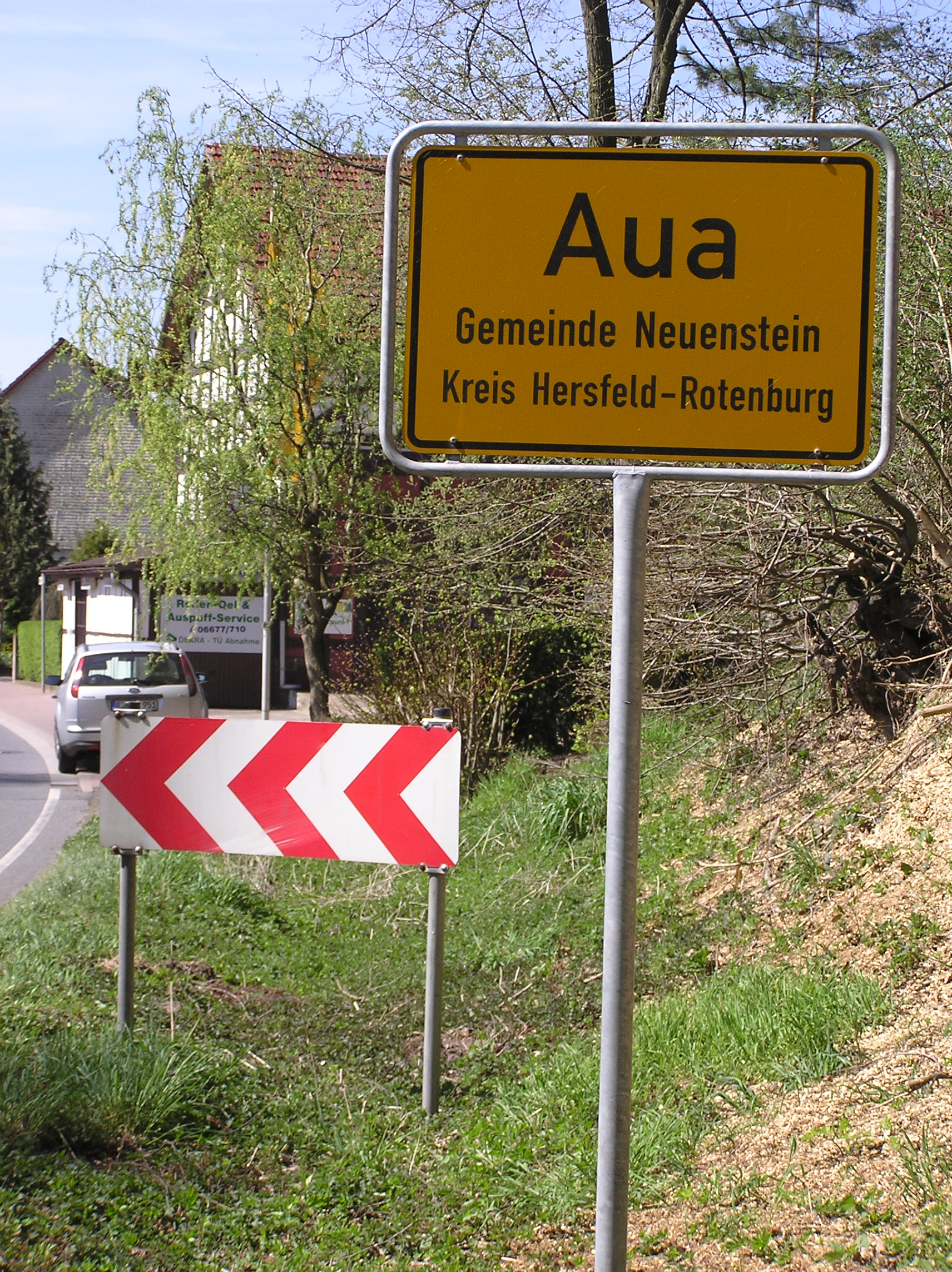 Ortsschild in Aua (Orteil von Neuenstein (Hessen)]